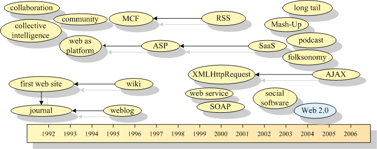 palabras buzz de web 2.0